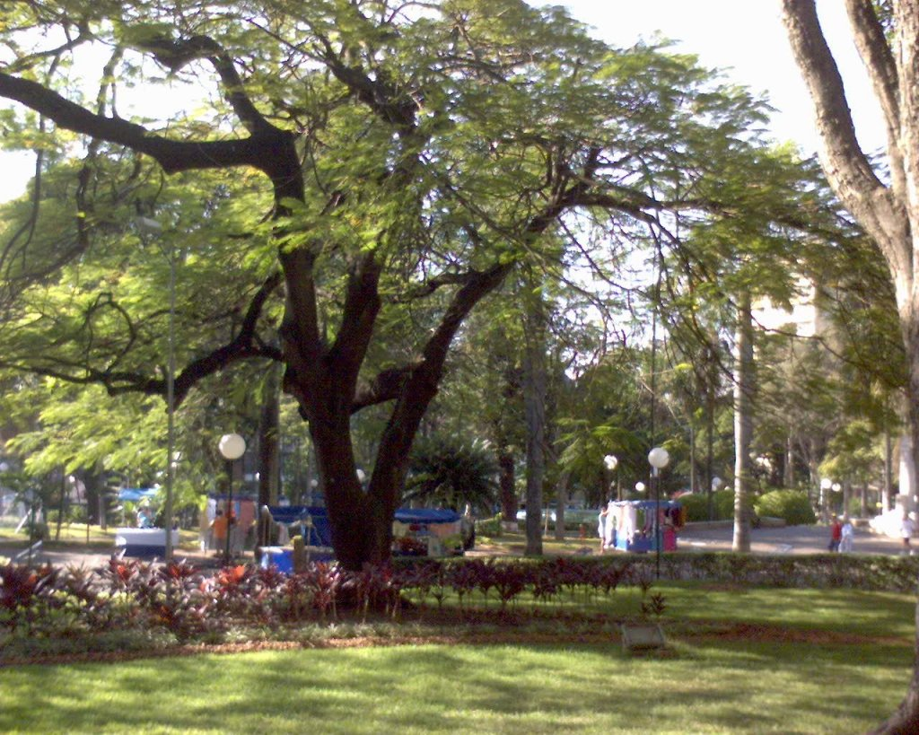 Praça Comendador Franz Müller - Americana, São Paulo, Brasil